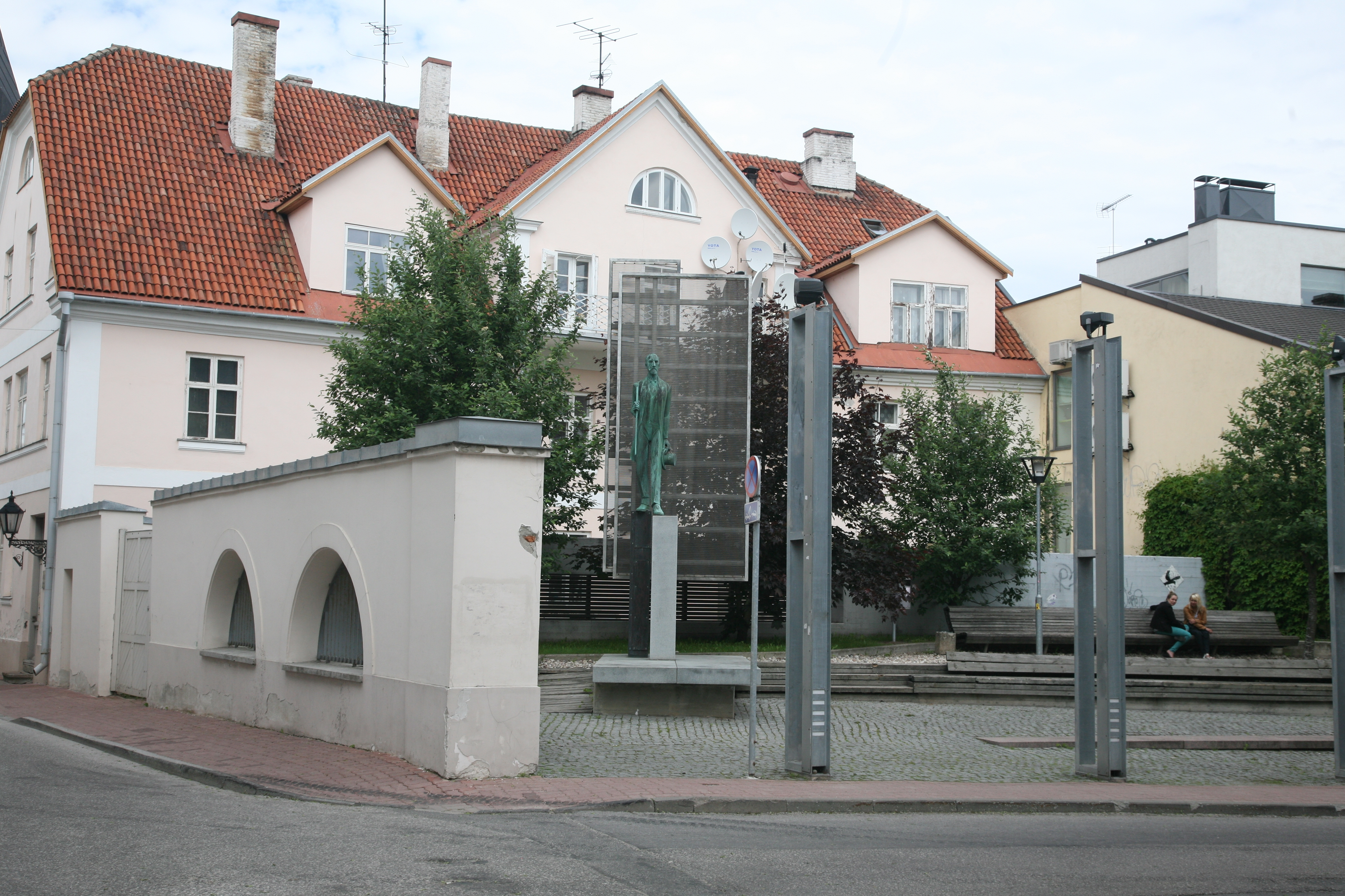 Tõnissoni plats Tartus Ülikooli ja Munga nurgal, vaade Ülikooli tänavalt, 28. mai 2013.